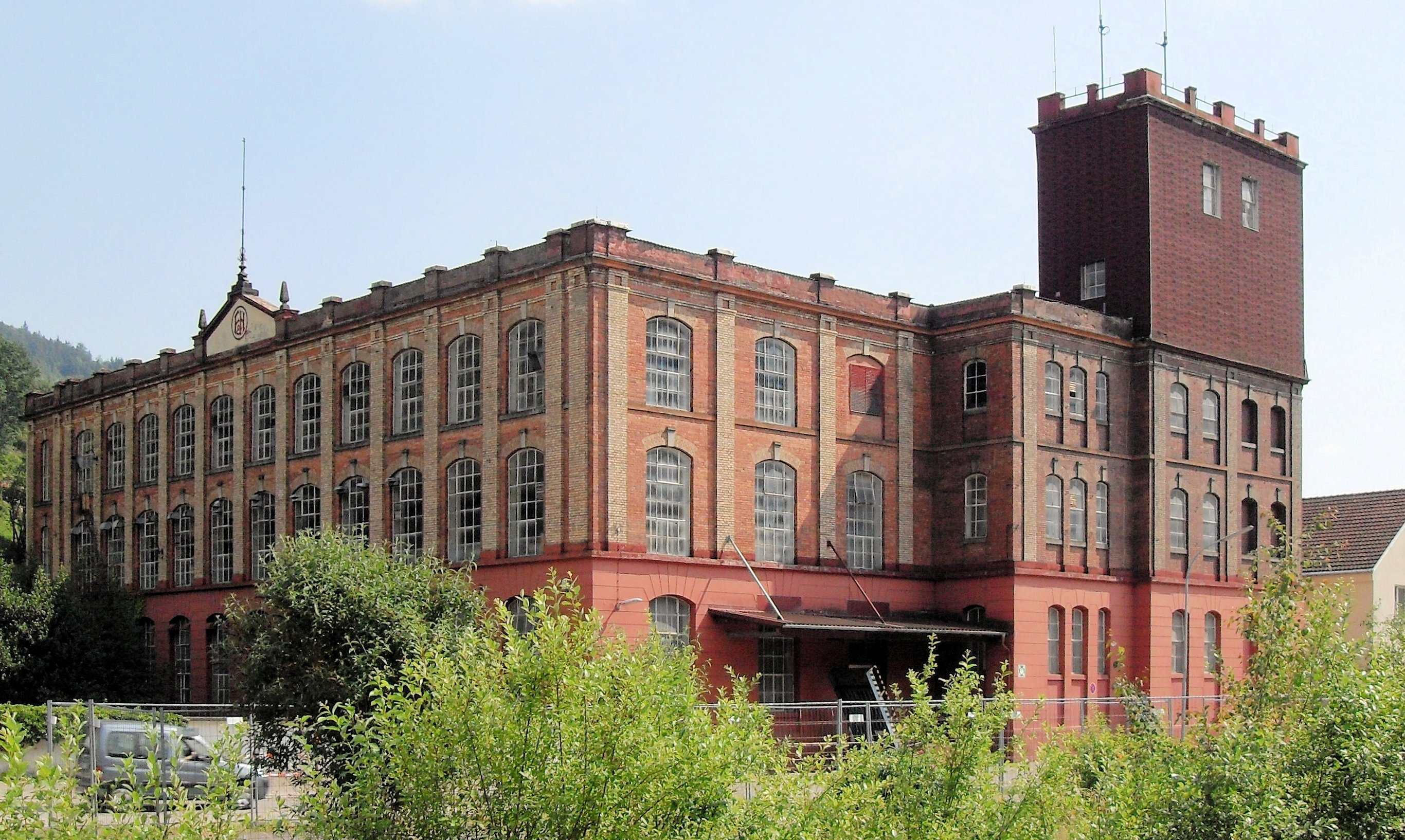 ehemalige (bis 1967) Baumwollspinnerei Fessmann & Hecker in Zell im Wiesental, Schwarzwald, Deutschland. Heute Handelsunternehmen für chemisch-technische Haushaltsprodukte.